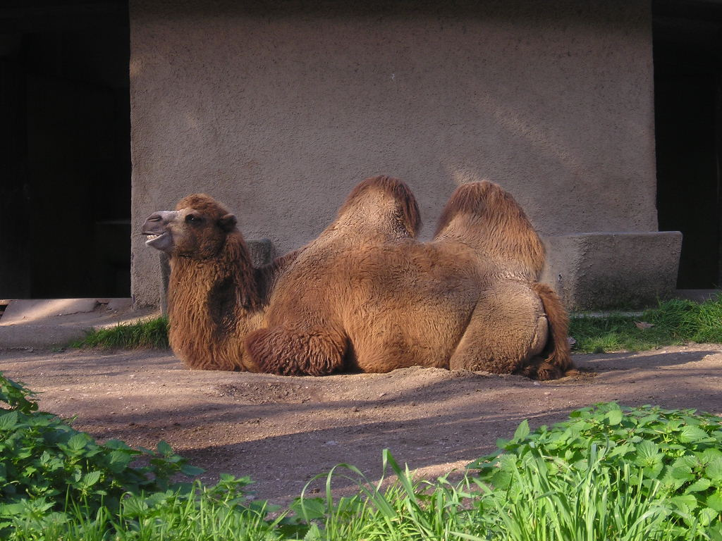 Camelus bactrianus